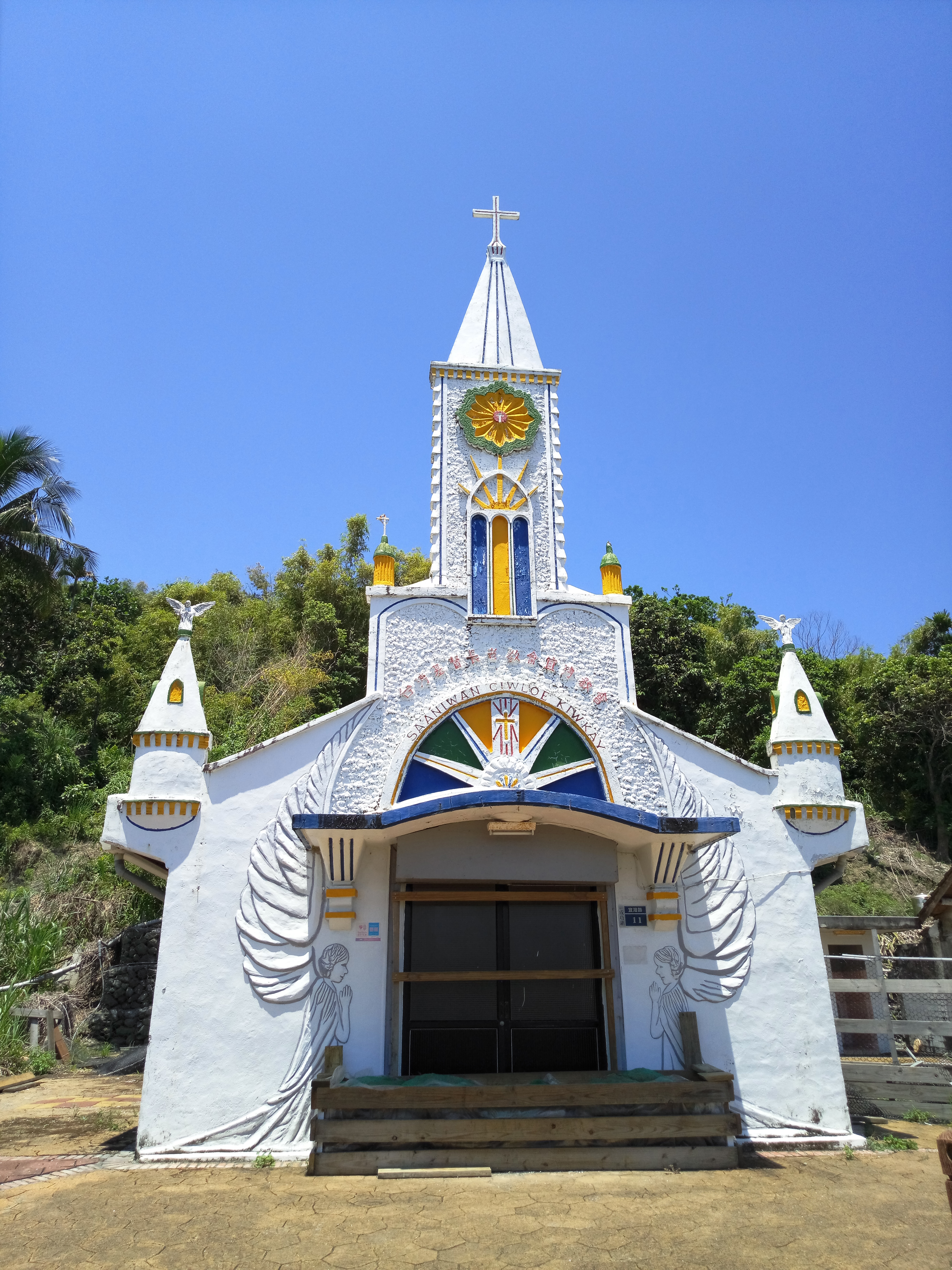 中文（台灣）: 宜灣長老教會，又稱卡片教堂，是臺東縣文化資產，隸屬台灣基督長老教會宜灣教會，位於臺東縣成功鎮宜灣路11號。